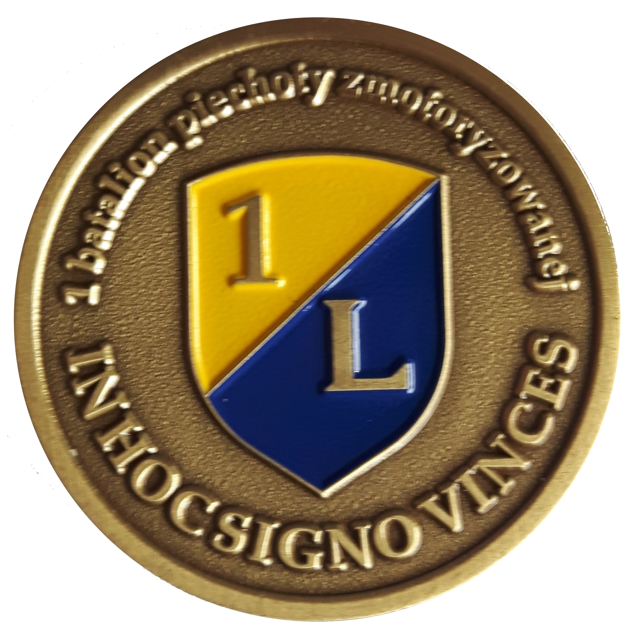 medal pamiątkowy 1 batalionu piechoty zmotoryzowanej 12 BZ